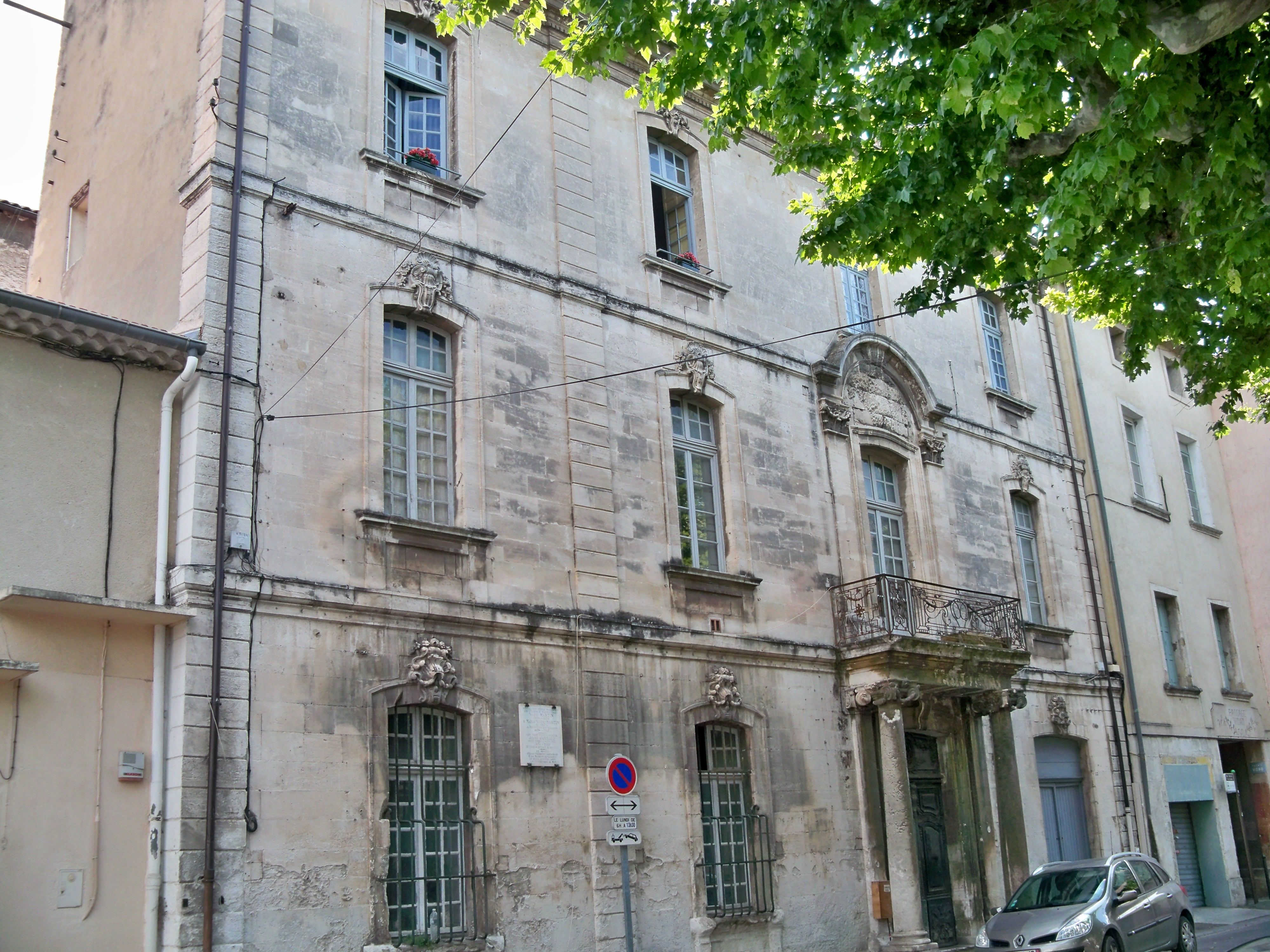 Hôtel d'Agarjardin, cheminée, décor intérieur